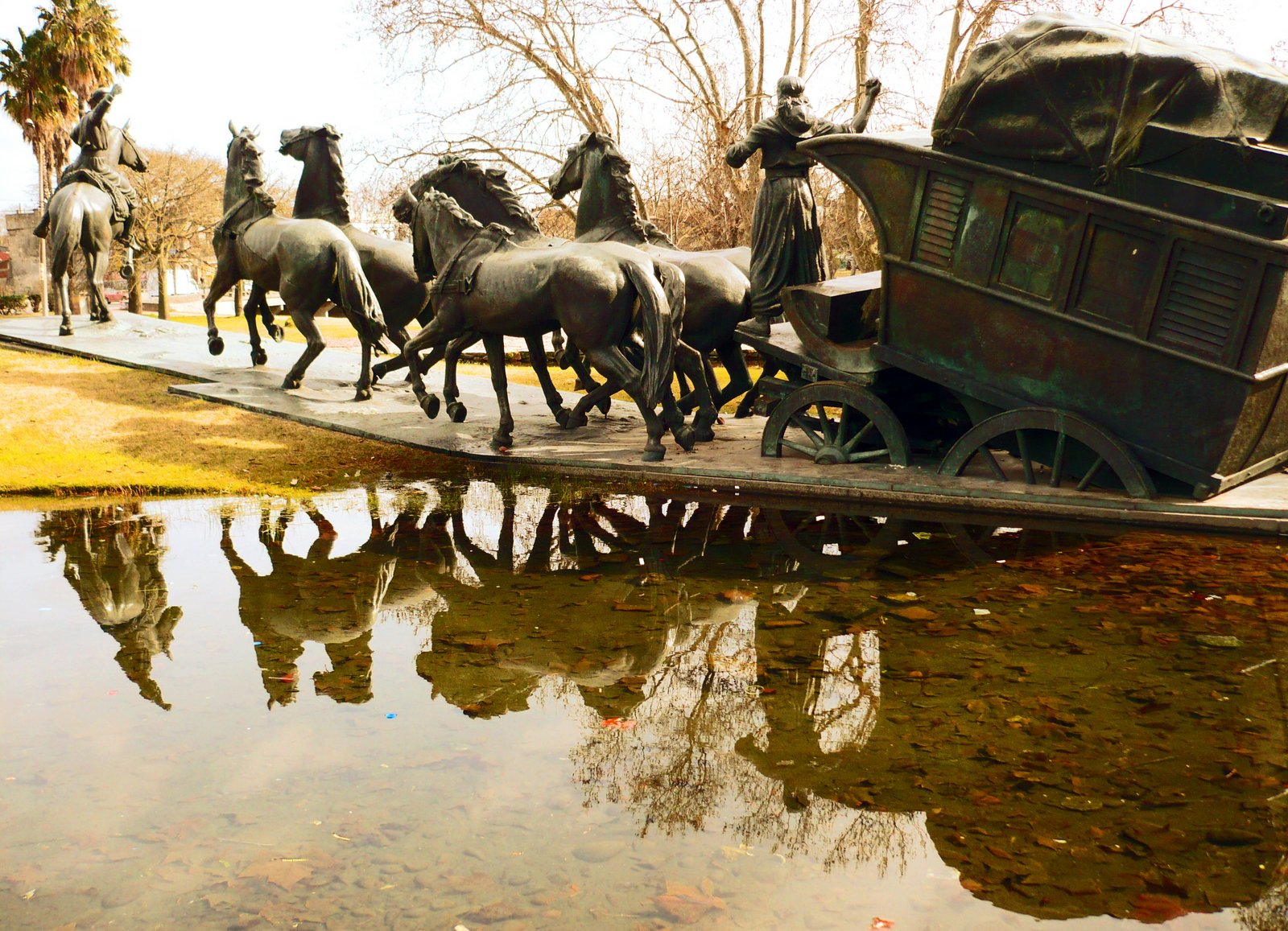 La Diligencia. Ubicada en el departamento de Montevideo